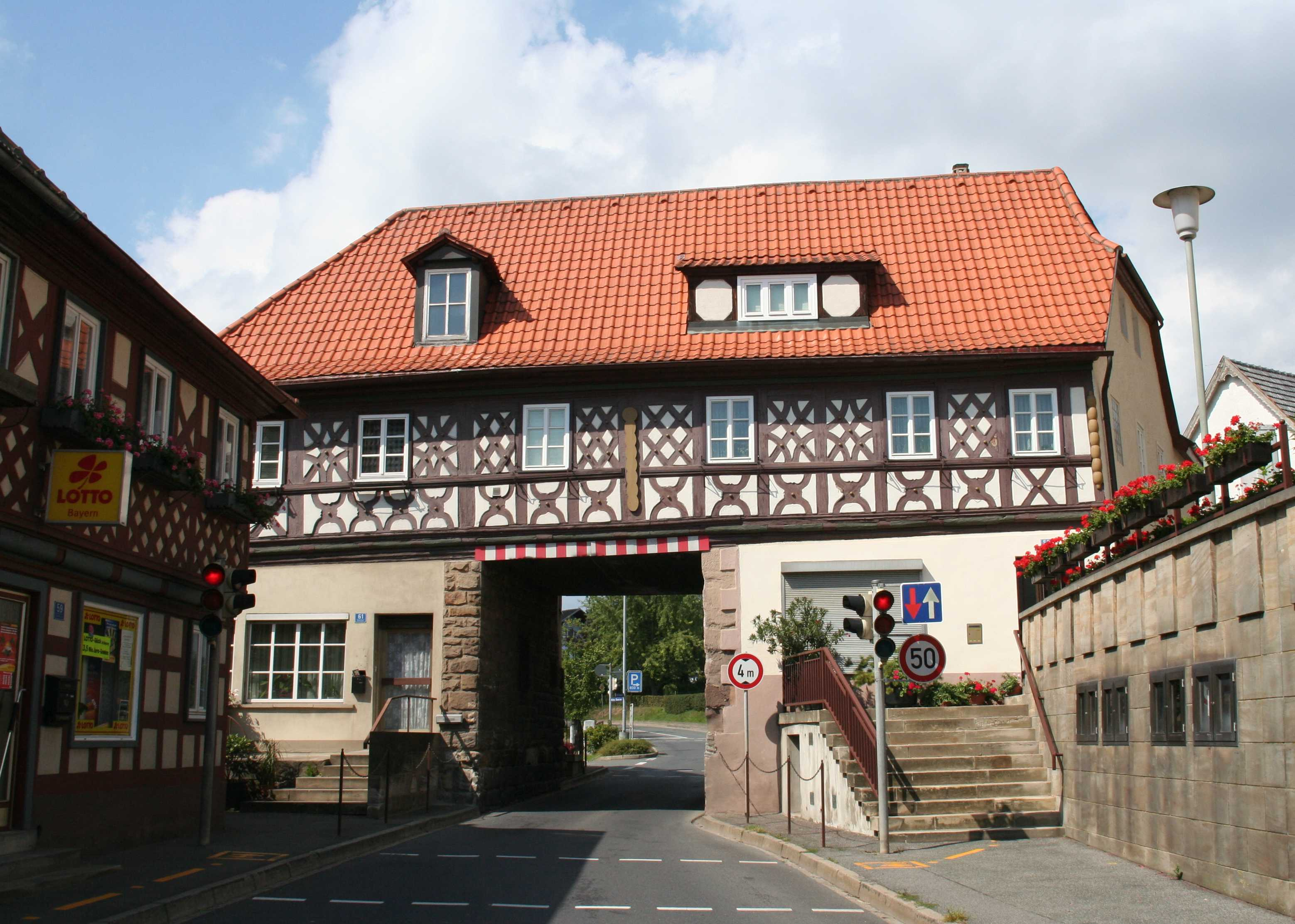 Torhaus Marktzeuln Landkreis Lichtenfels in Bayern